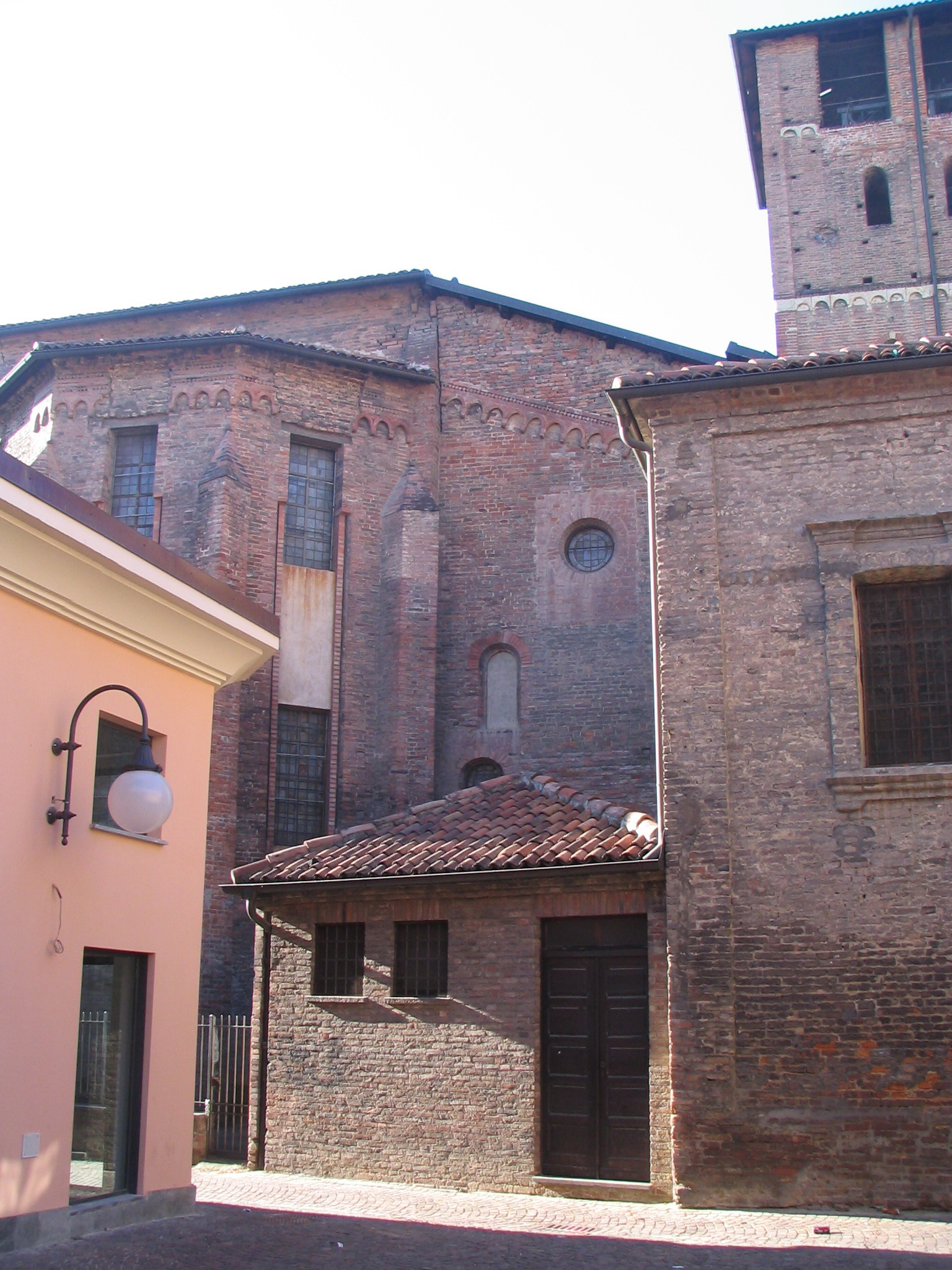 Collegiata di San Secondo, Asti, zona absidale